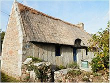 chaumière, un foyer, penty, pierres debout, granit, mein zao, casita de cubierta vegetal típica del Finisterre sur